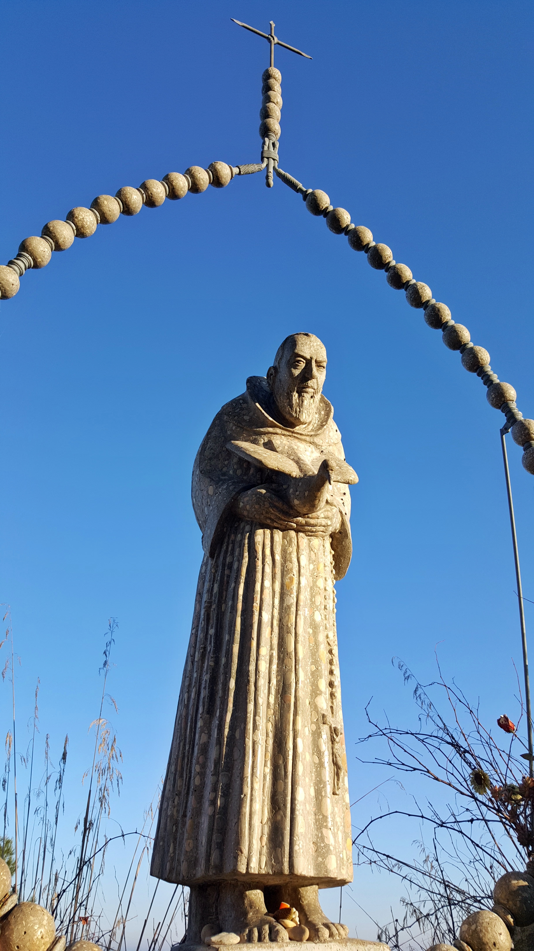 San Benedetto del Tronto, statua di Padre Pio da Pietrelcina in contrada Barattelle a pochi metri dal Museo Pietraia dei Poeti.